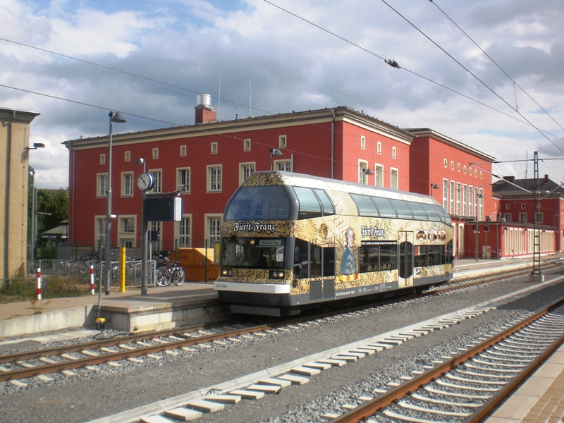 Schienenbus 670 004 "Fürst Franz" am Dessauer Hauptbahnhof, Gleis 1 am 26.06.2011